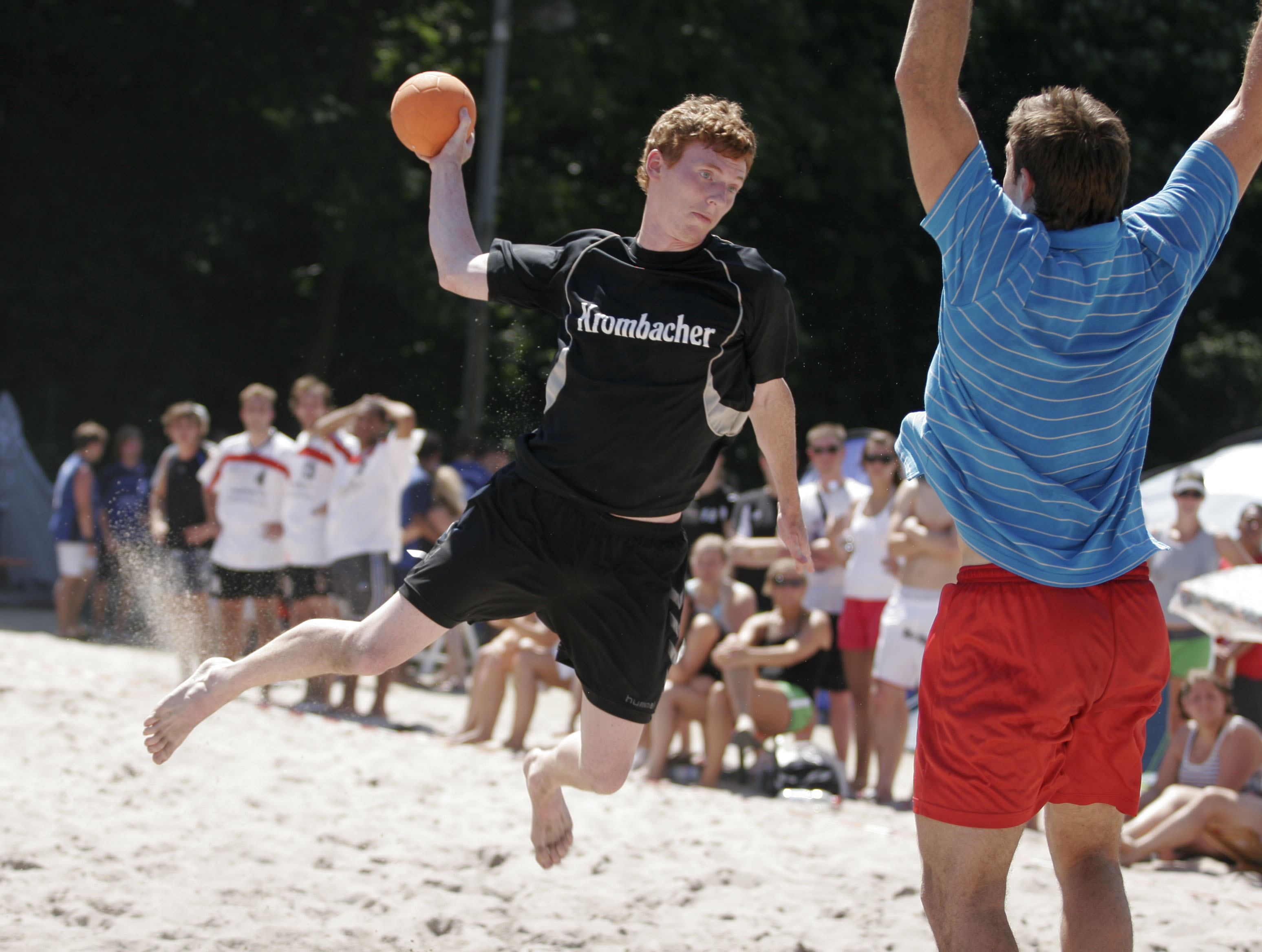 Penaltyshoot beim Beachhandball. Aufgenommen beim Beachhandballturnier in Weinheim 2007